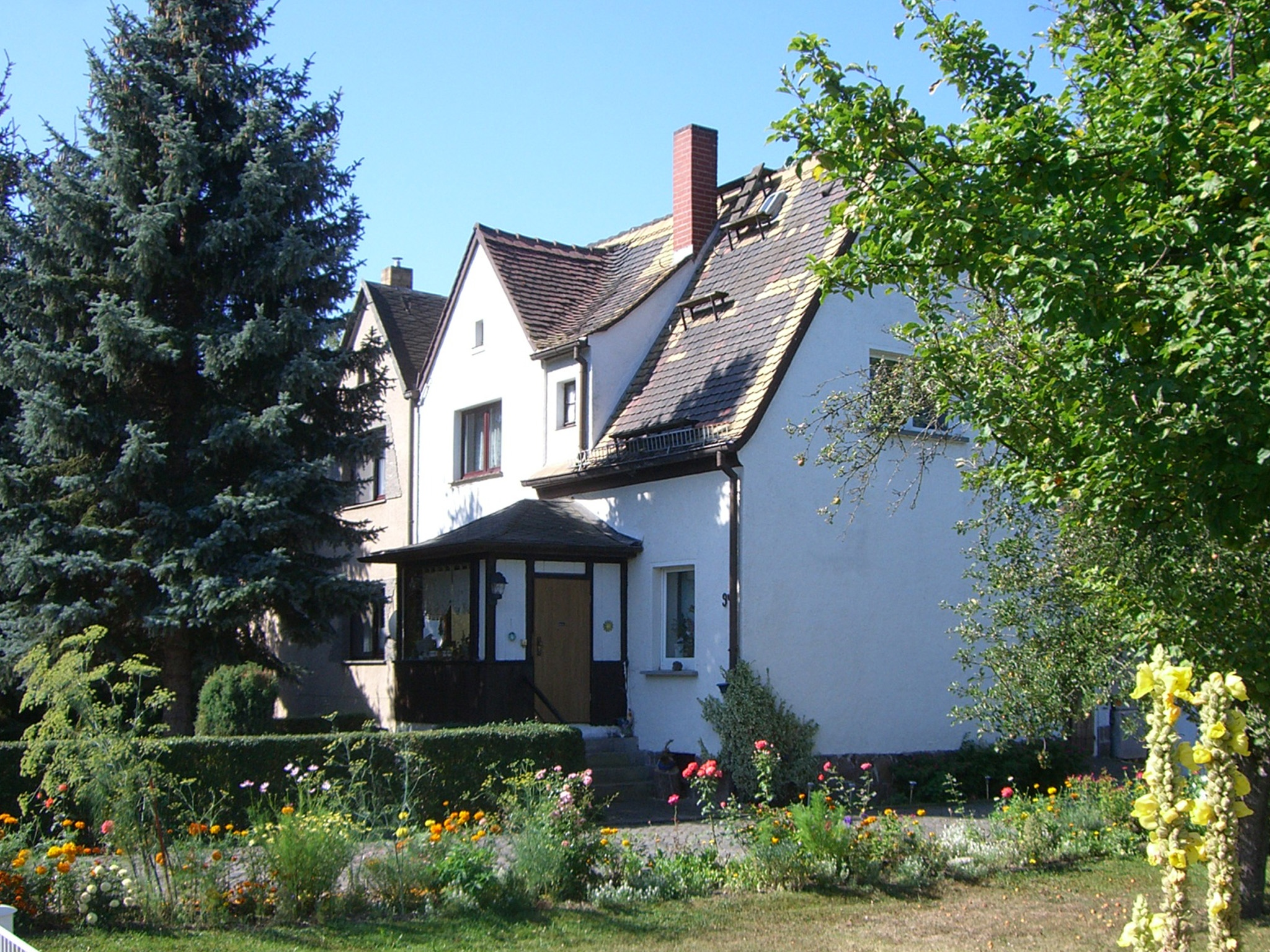 Eines der ehemaligen Kriegsversehrten-Häuser in der Siedlung Auenhain (Markkleeberg)